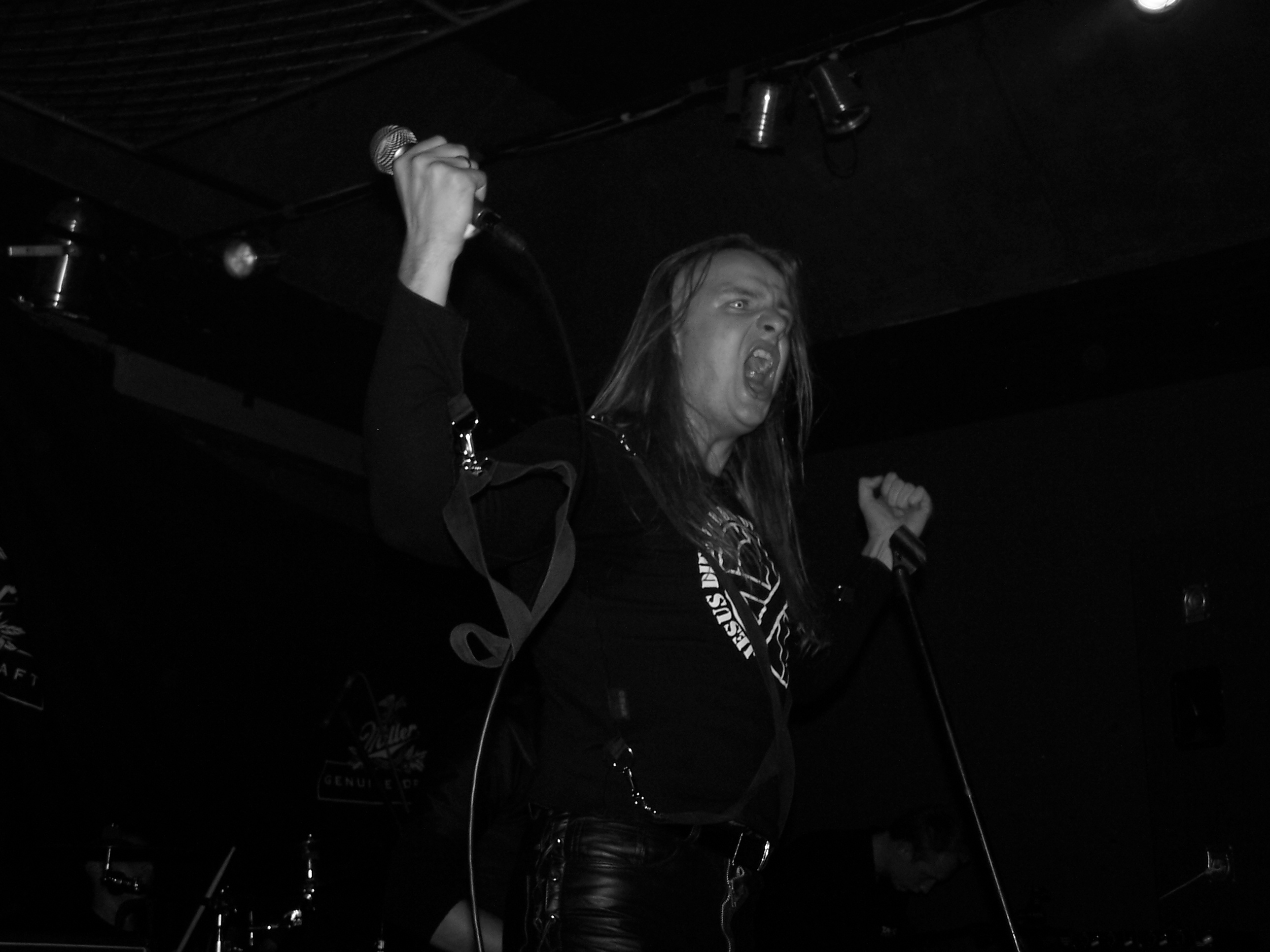 Przemysław Olbryt - wokalista zespołu Asgaard.